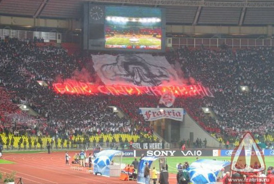 Перфоманс на матче со "Спортингом". 2006 год